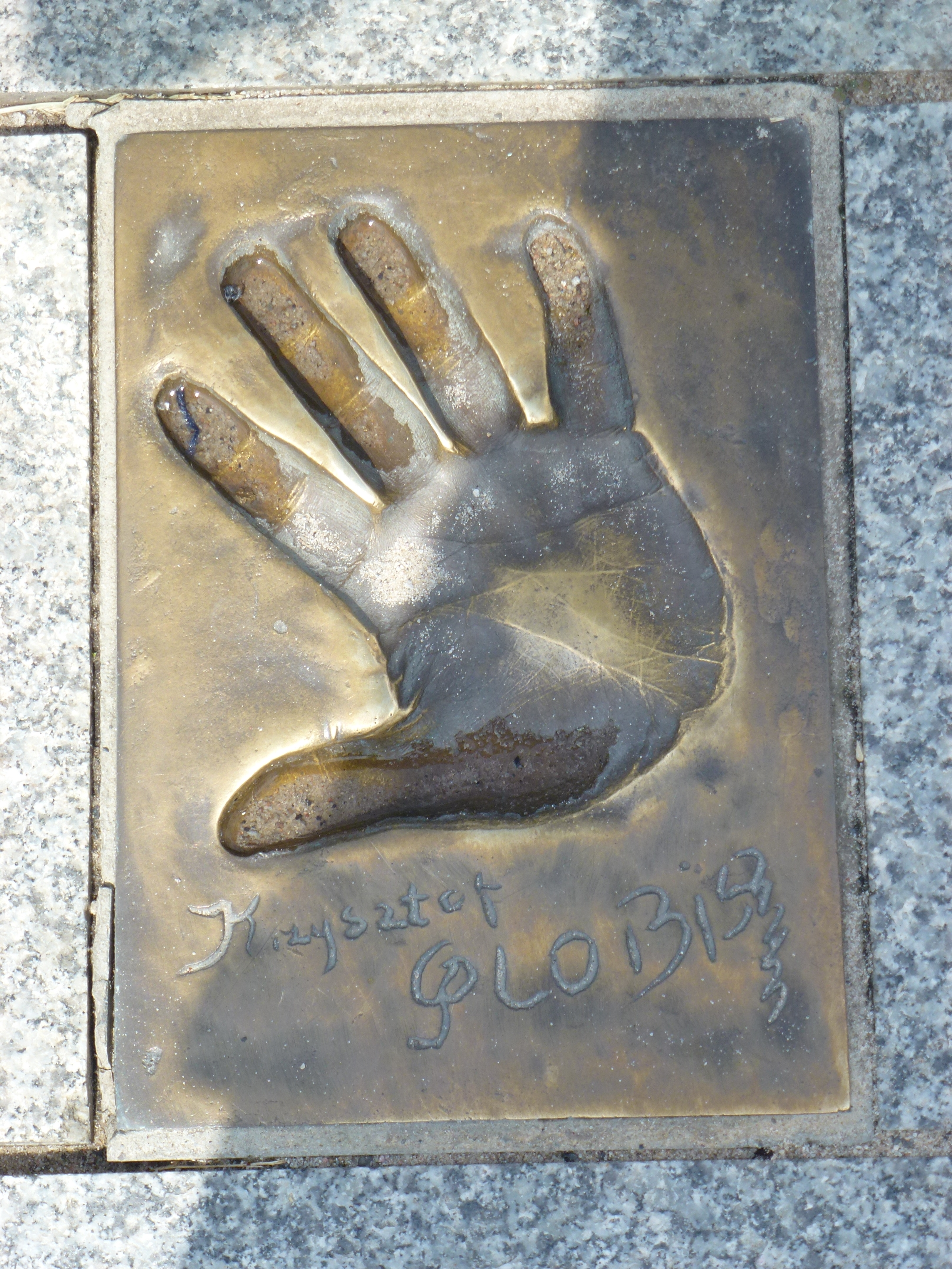 Odcisk gwiazdy na ul. Aleji Gwiazd w Międzyzdrojach woj. zachodniopomorskie pow. kamieński